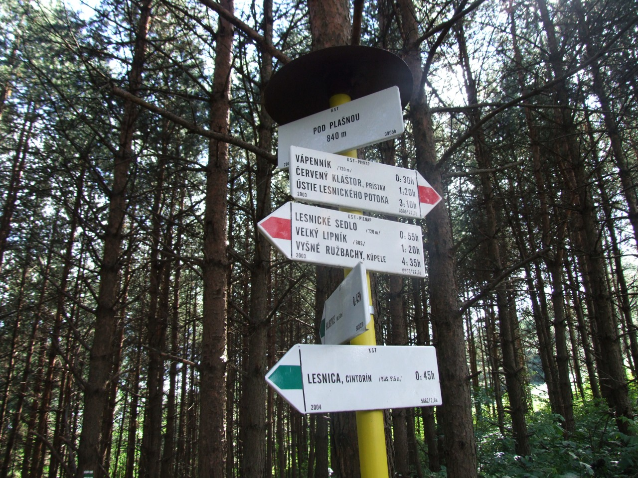 Rozdroże szlaków turystycznych pod Płaśnią w słowackich Pieninach